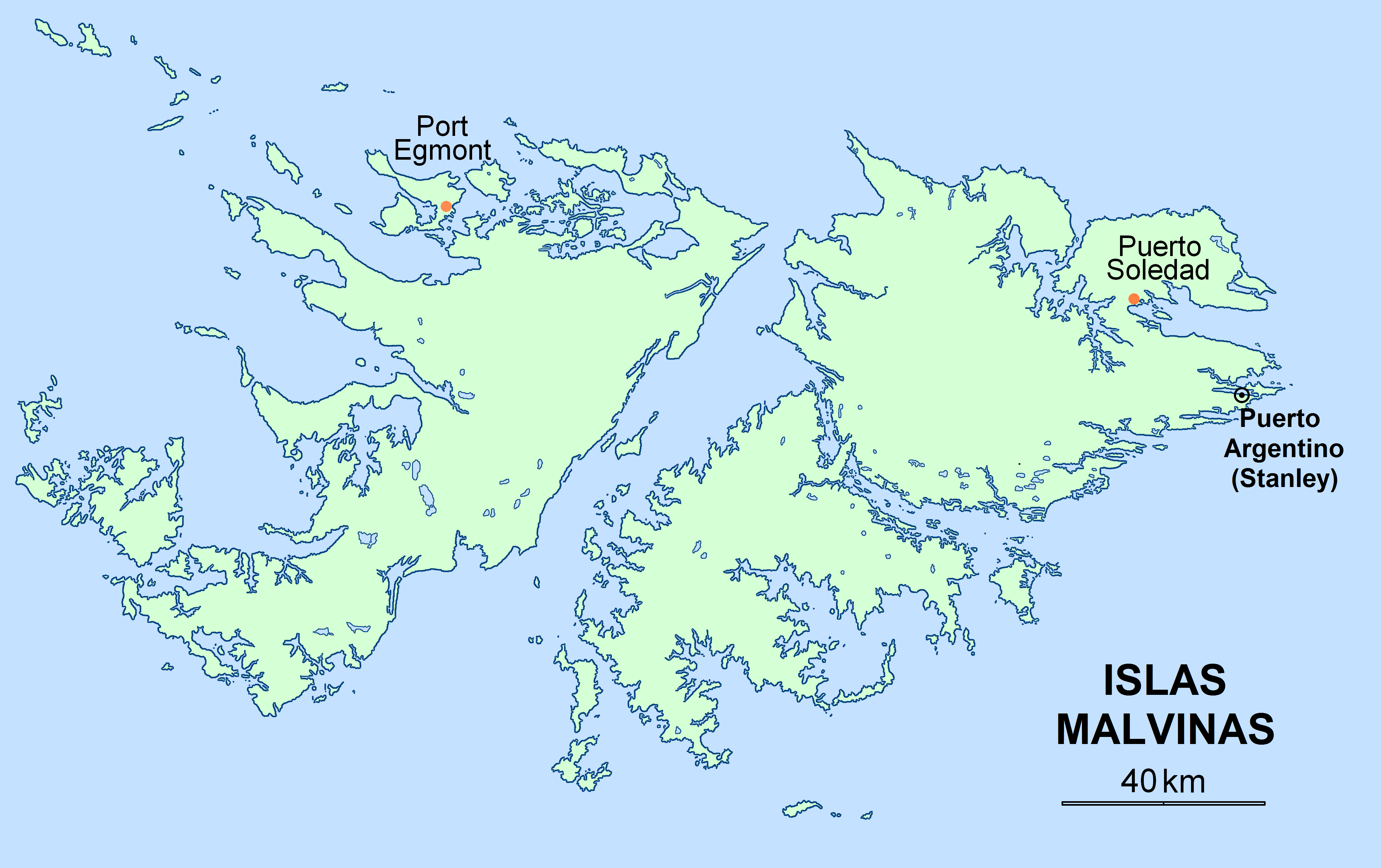 =Location map for the historical settlements of Port Egmont and Puerto Soledad, Islas Malvinas